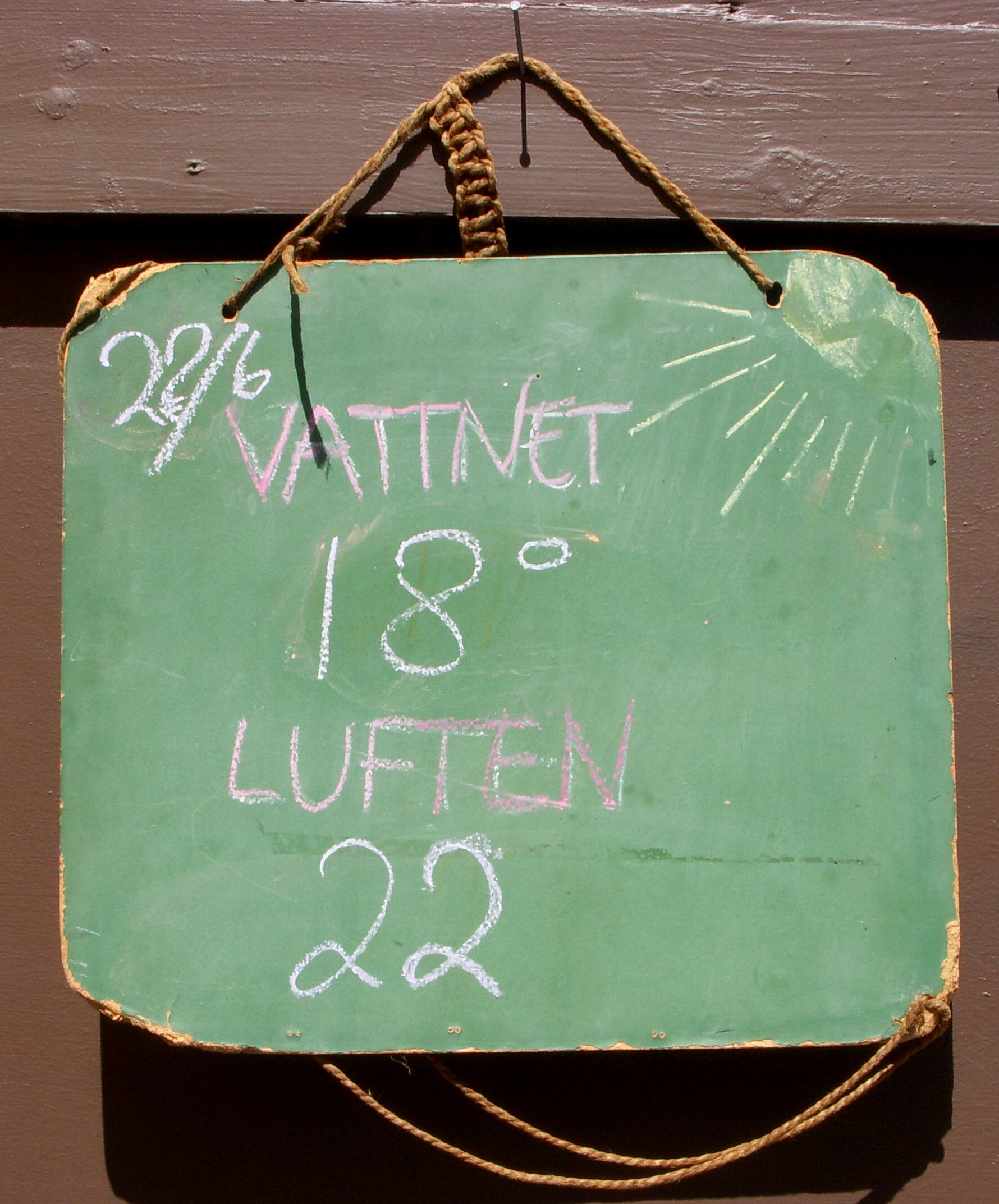 Vatten- och lufttemperatur vid Farstabadet 22 juni 2009